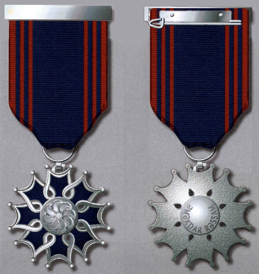 “Əməkdar rəssam” fəxri adının döş nişanı